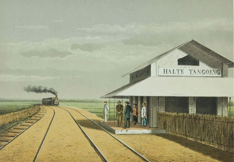 Litografi. Litograf berwarna karya van Rappard: "Stasiun KA di Tangoeng" (St. Tanggung sekarang?)